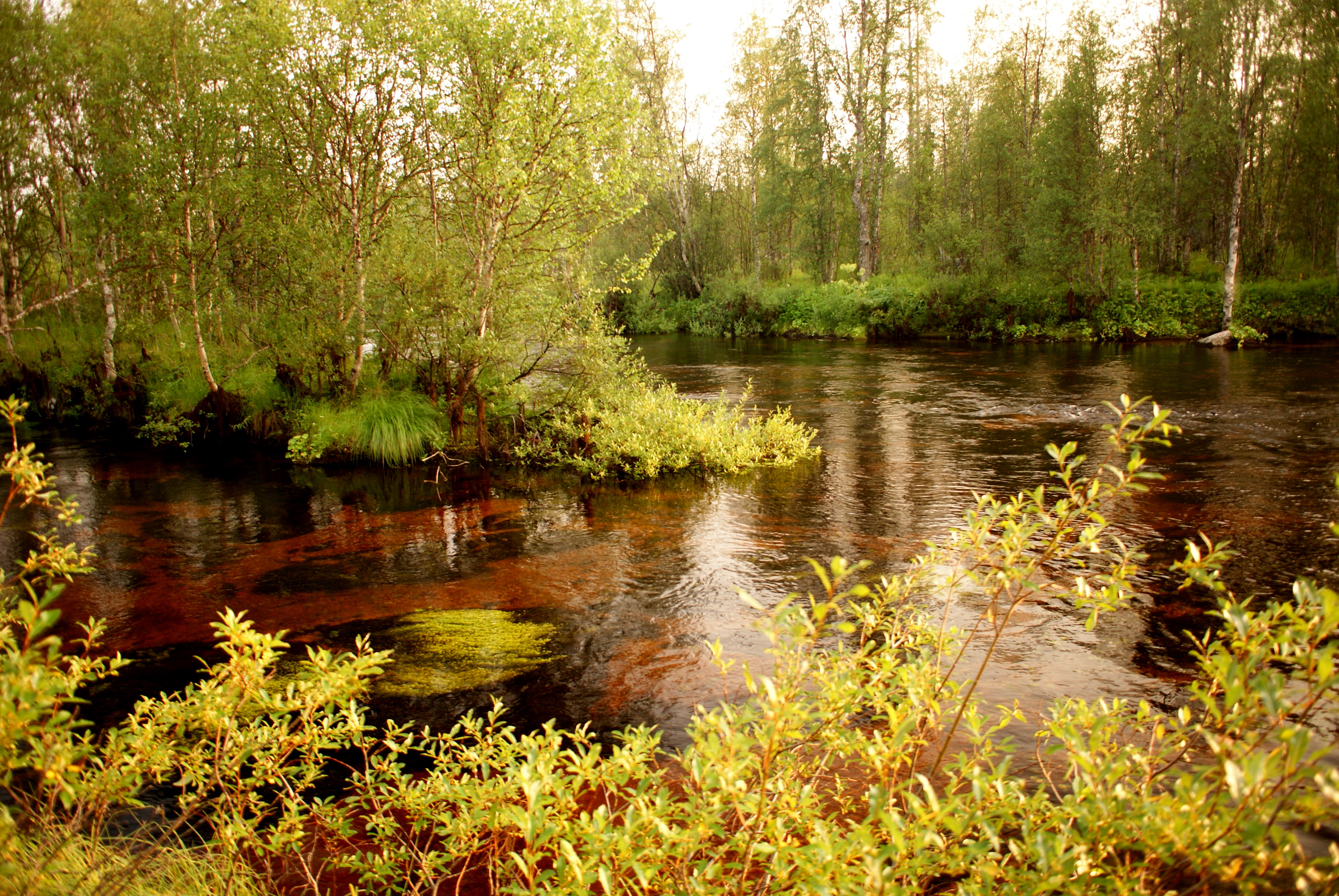 Верховья реки Ёна